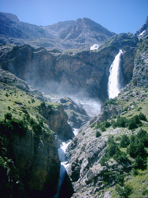 Siguiendo el camino que lleva al monte perdido.